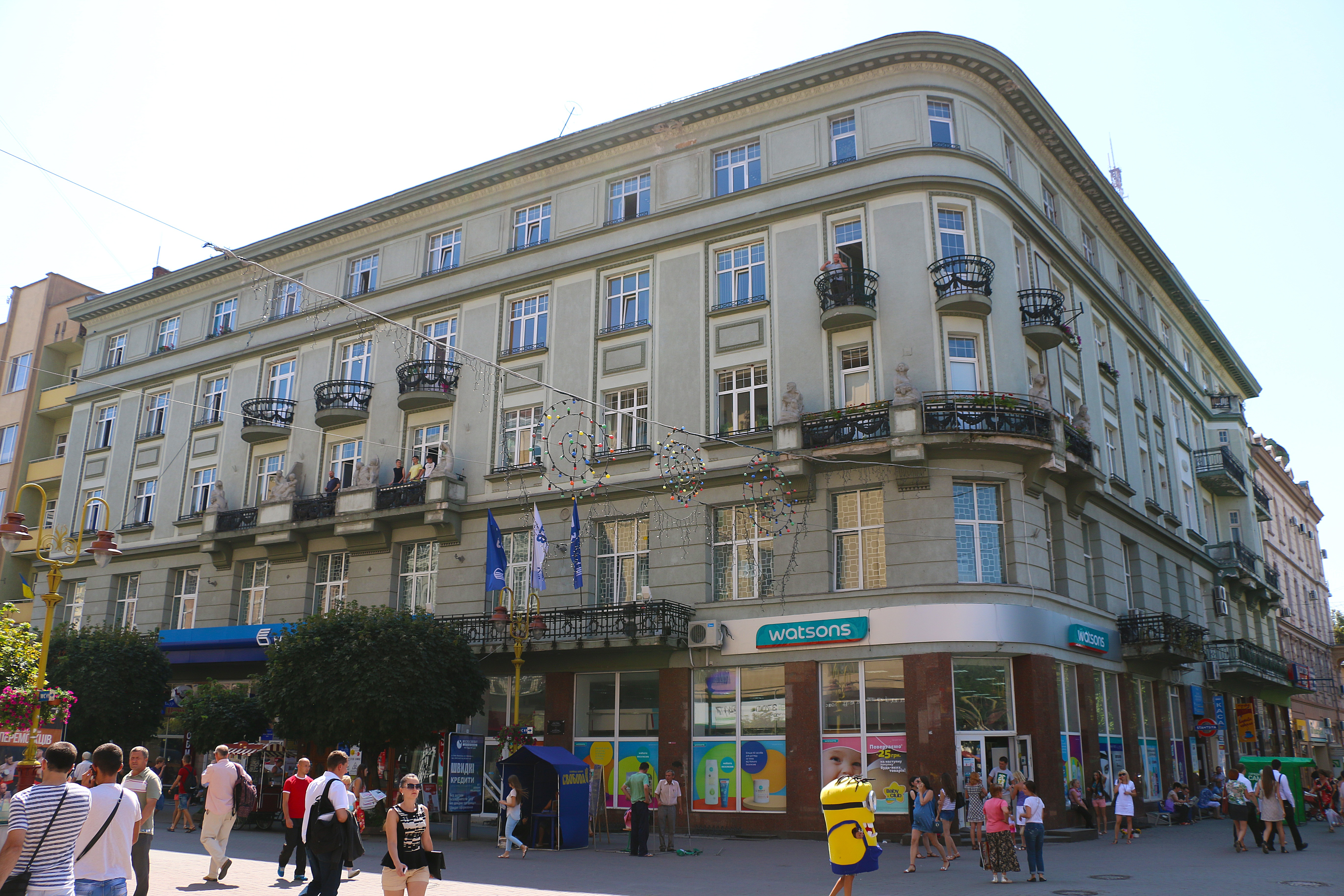 Готель "Уніон" (мур.), Івано-Франківськ, вул. Незалежності, 4